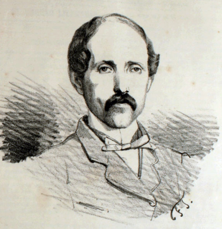 Alejandro Reyes Cotapos; abogado y político chileno. Nació en Santiago en 1825. Falleció en la misma ciudad, el 8 de enero de 1884.